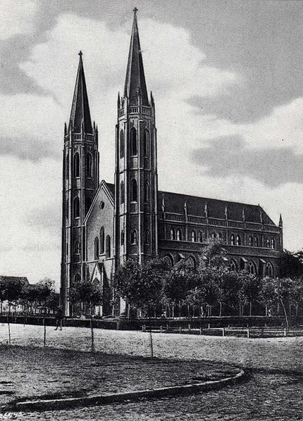 Immanuelkirche in Schirwindt